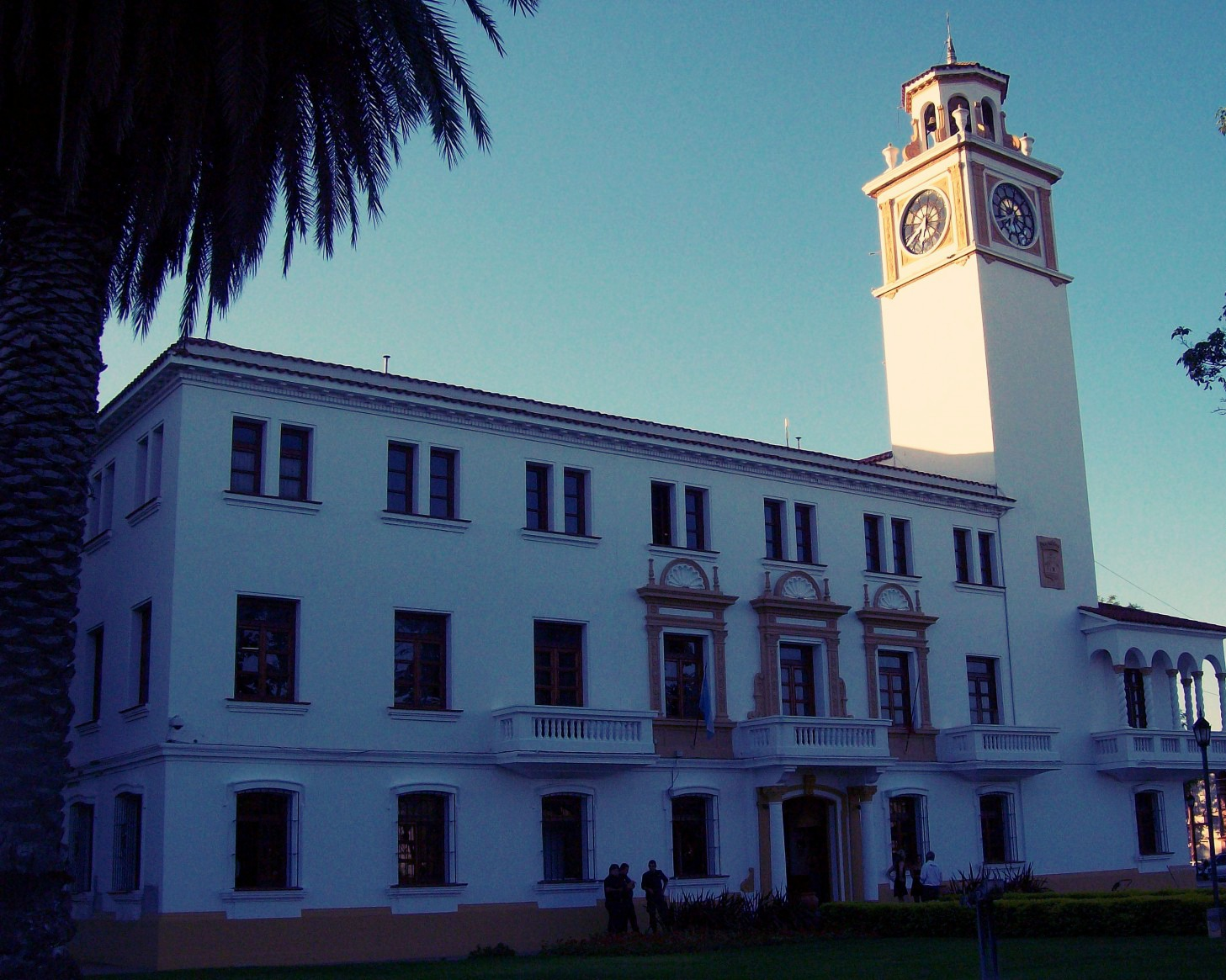 Con una edificación imponente, la Casa de Gobierno de Santiago del Estero se construyó donde inicialmente se planificaba llevar a cabo una terminal de ómnibus. Como ya había una construcción en hormigón armado, se decidió utilizarla en lugar de demolerla y se diseñó el edificio sobre estos cimientos. Fue el arquitecto Anibal Oberlander quien fue el encargado de llevar adelante la edificación., Presenta un estilo español con impronta colonial, tiene una torre campanario la cual estaba pautado para su primer destino, mientras que los balcones complejamente decorados fueron diseñados por el escultor santiagueño Roberto Delgado. Inicialmente estaba destinada al Municipio, pero en el año 1952 paso a ser la sede del Poder Ejecutivo Provincial.